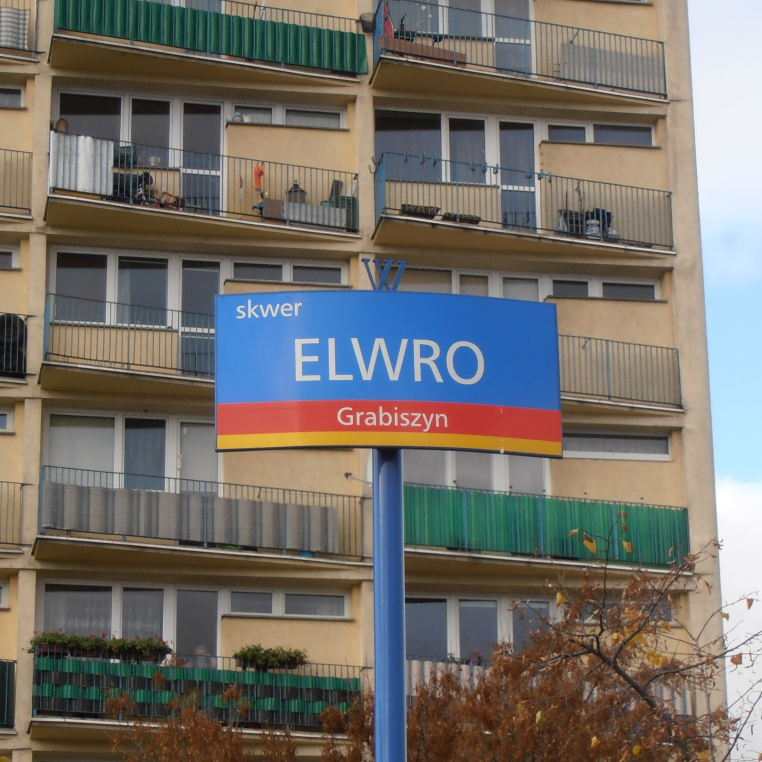 Wrocław. Tabliczka z nazwą „Skwer Elwro”.